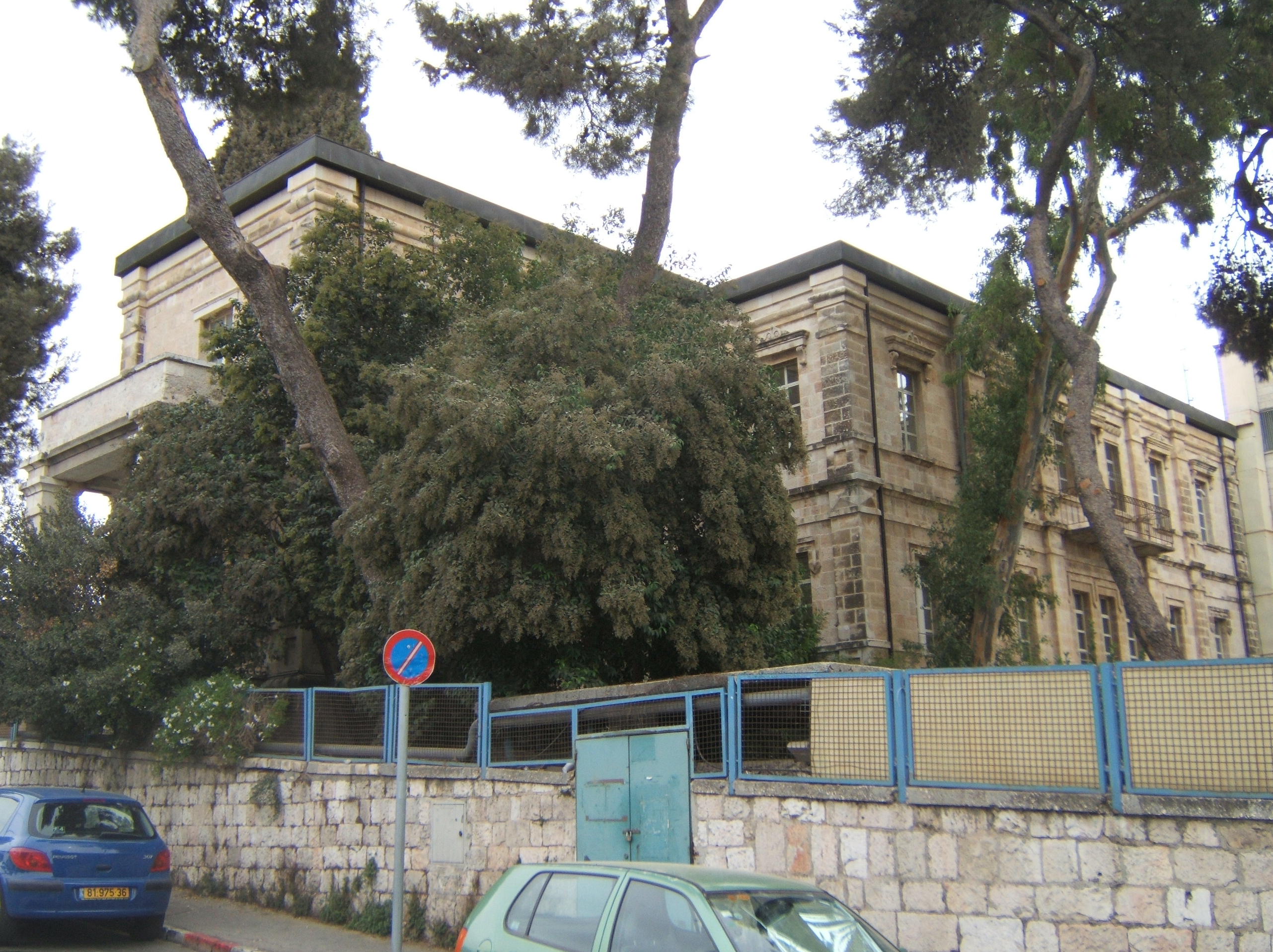 Rothschild Hospital, Jerusalem